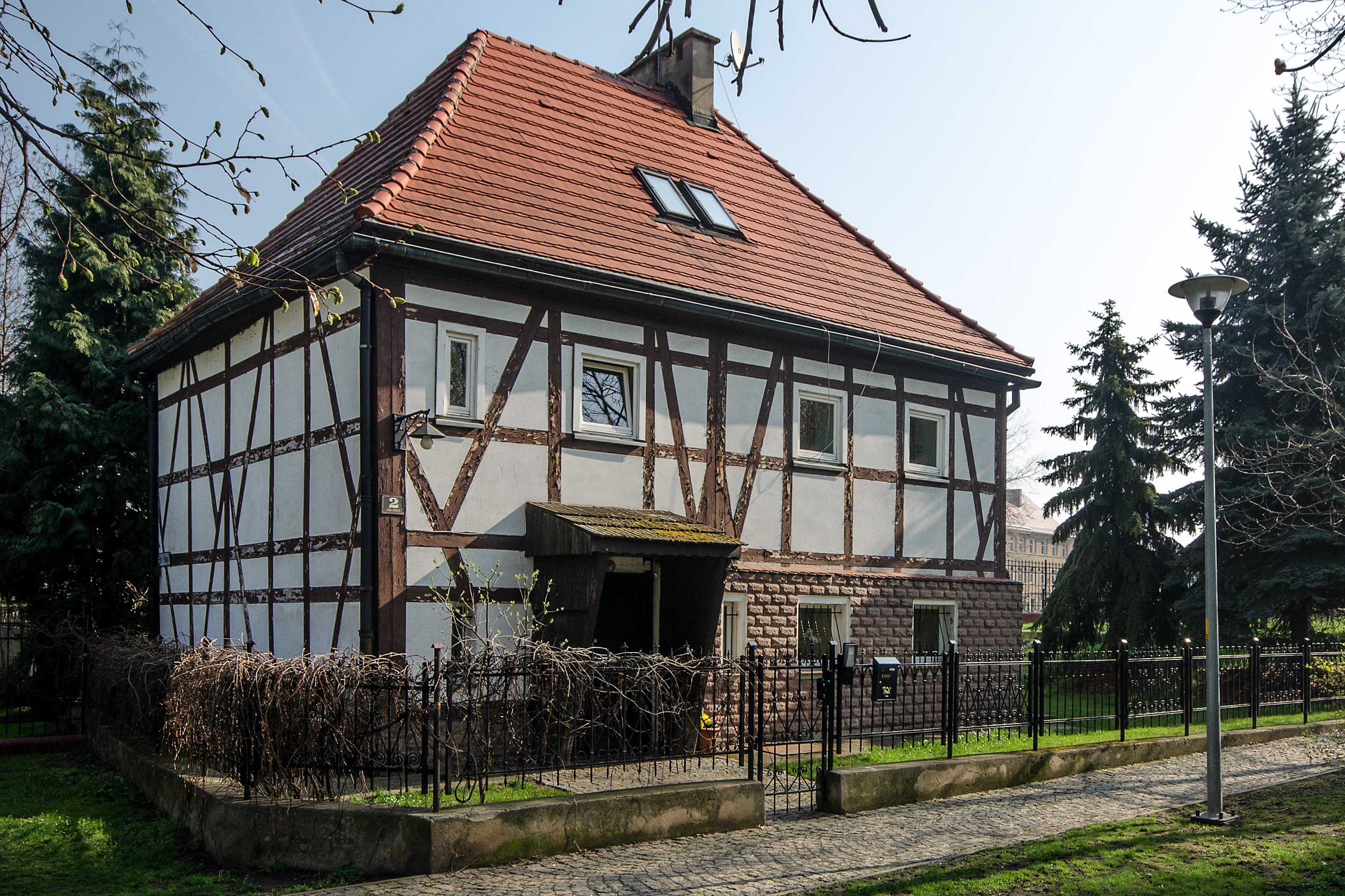 Jawor, pastorówka (d. dom dzwonnika), poł. XVII